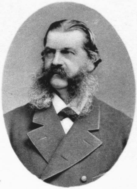 Porträtfotografie von Eduard Hallberger.